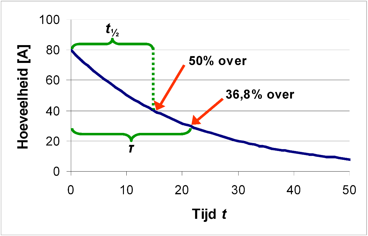 Vervaltijden in een grafiek van een vervalproces. Eigen grafiek, 19 juli 2005.